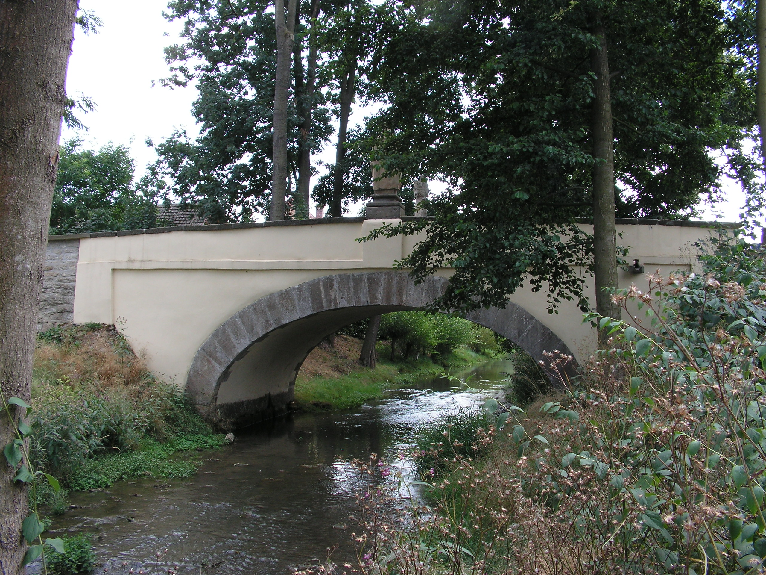 Silniční most v Osíku přes říčku Desnou